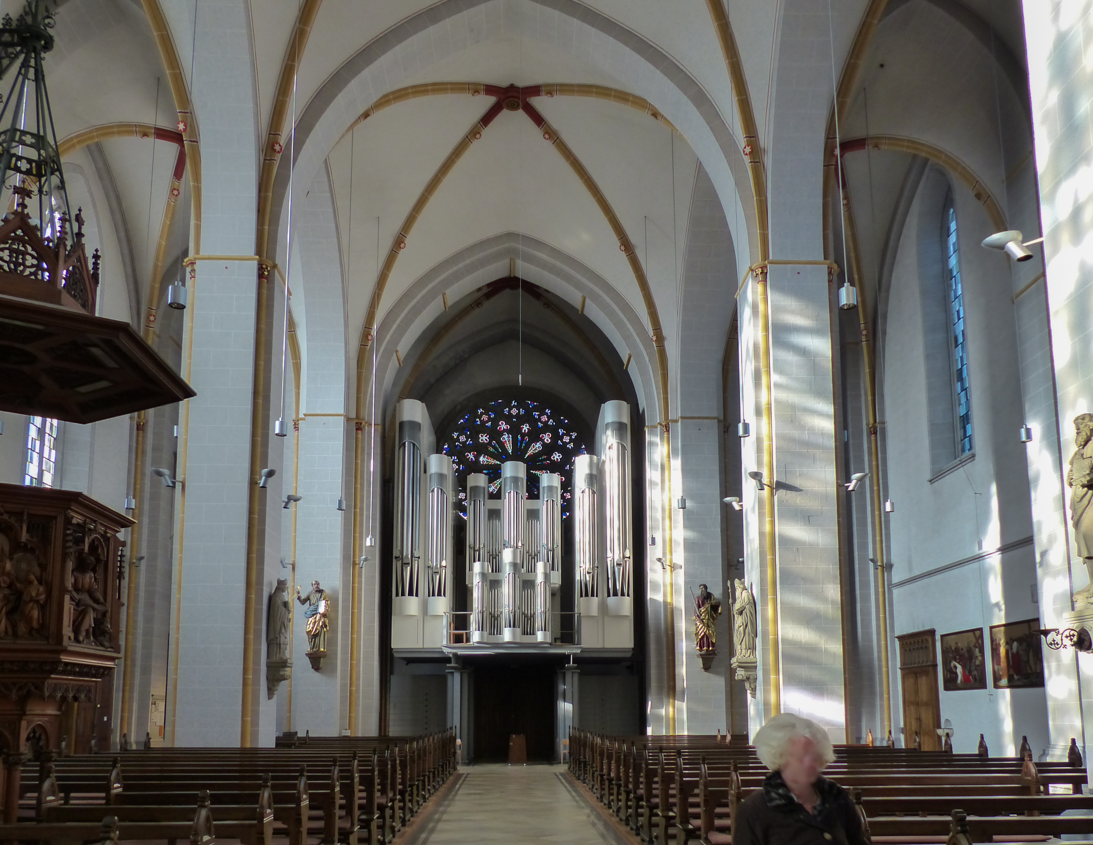 Osnabrück, St. Johann